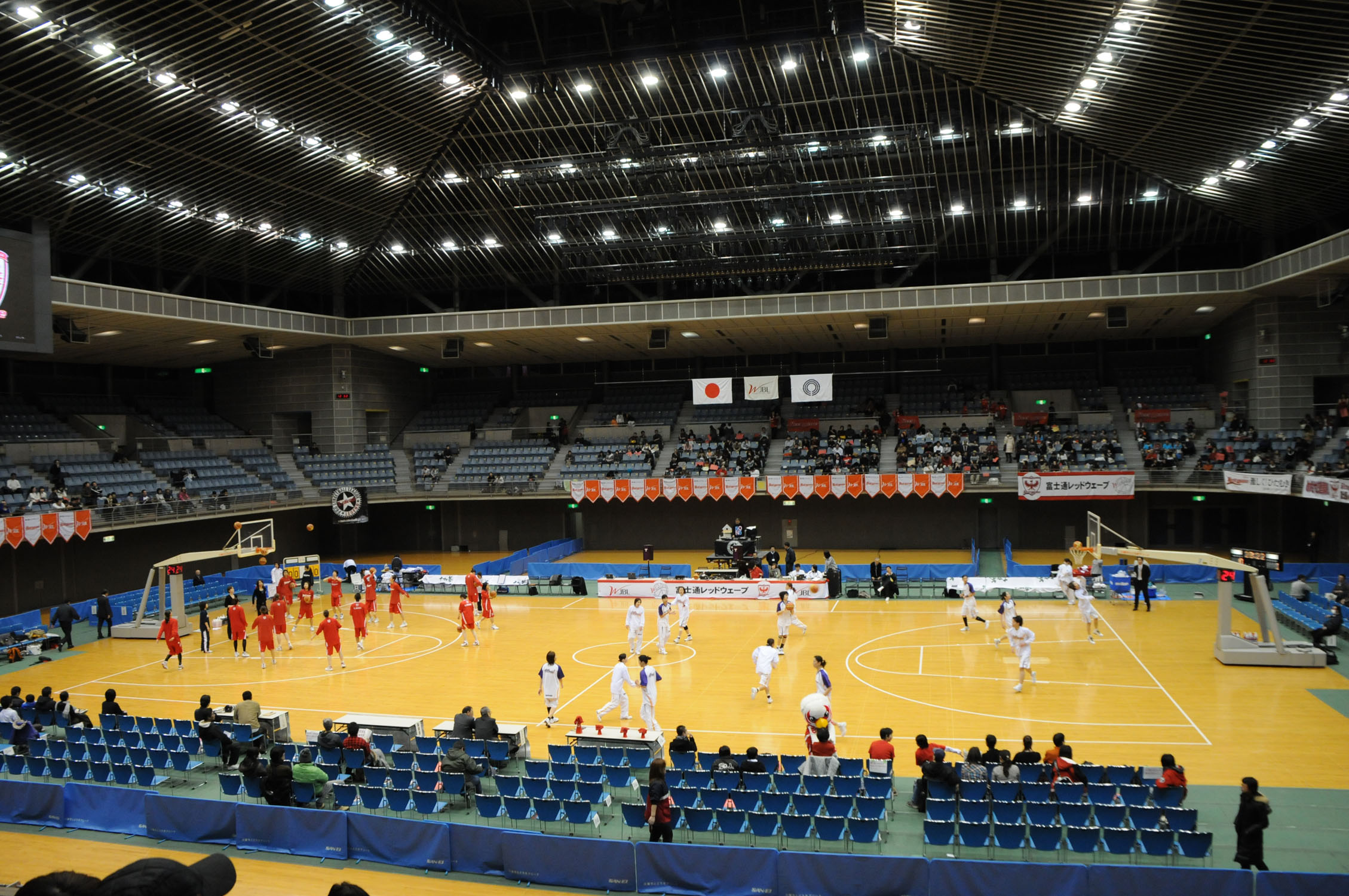 川崎市とどろきアリーナ、2009年2月8日。